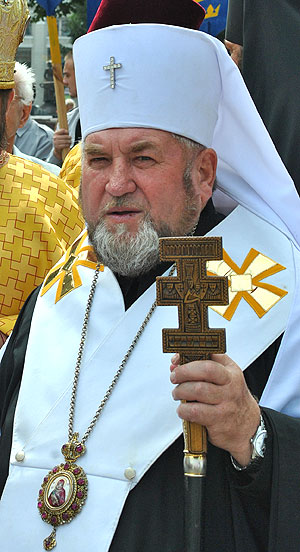 Архієпископ і Митрополит Тернопільсько-Зборівський УГКЦ Василь (Семенюк).